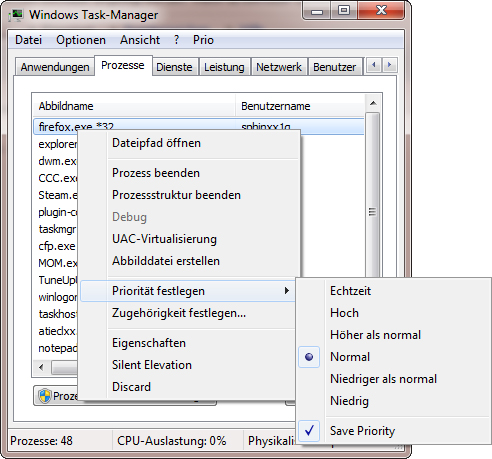 Prio eingebunden im Task-Manager